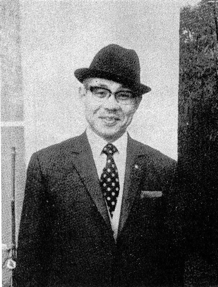 朝鮮で活躍した牧師織田楢次